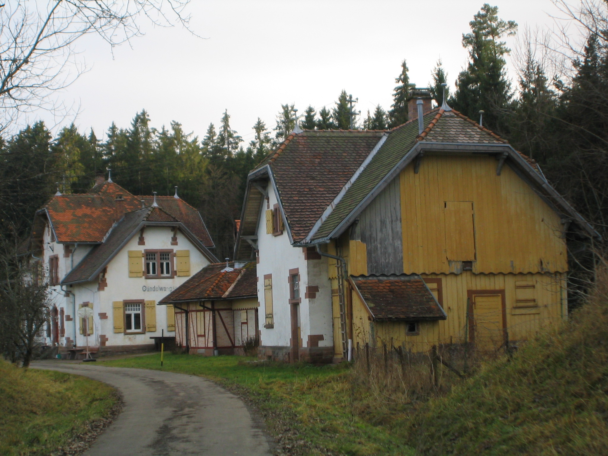 Der ehemalige Bahnhof Gündelwangen